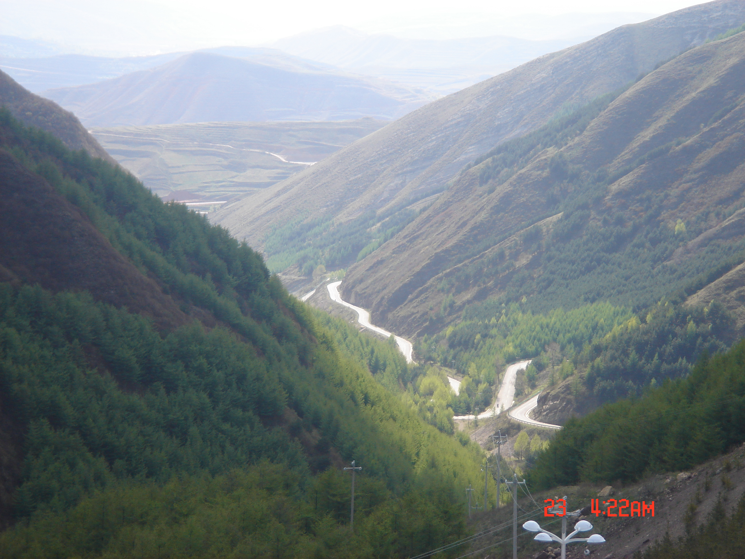 中文（中国大陆）: 六盘山红军长征纪念馆西眺